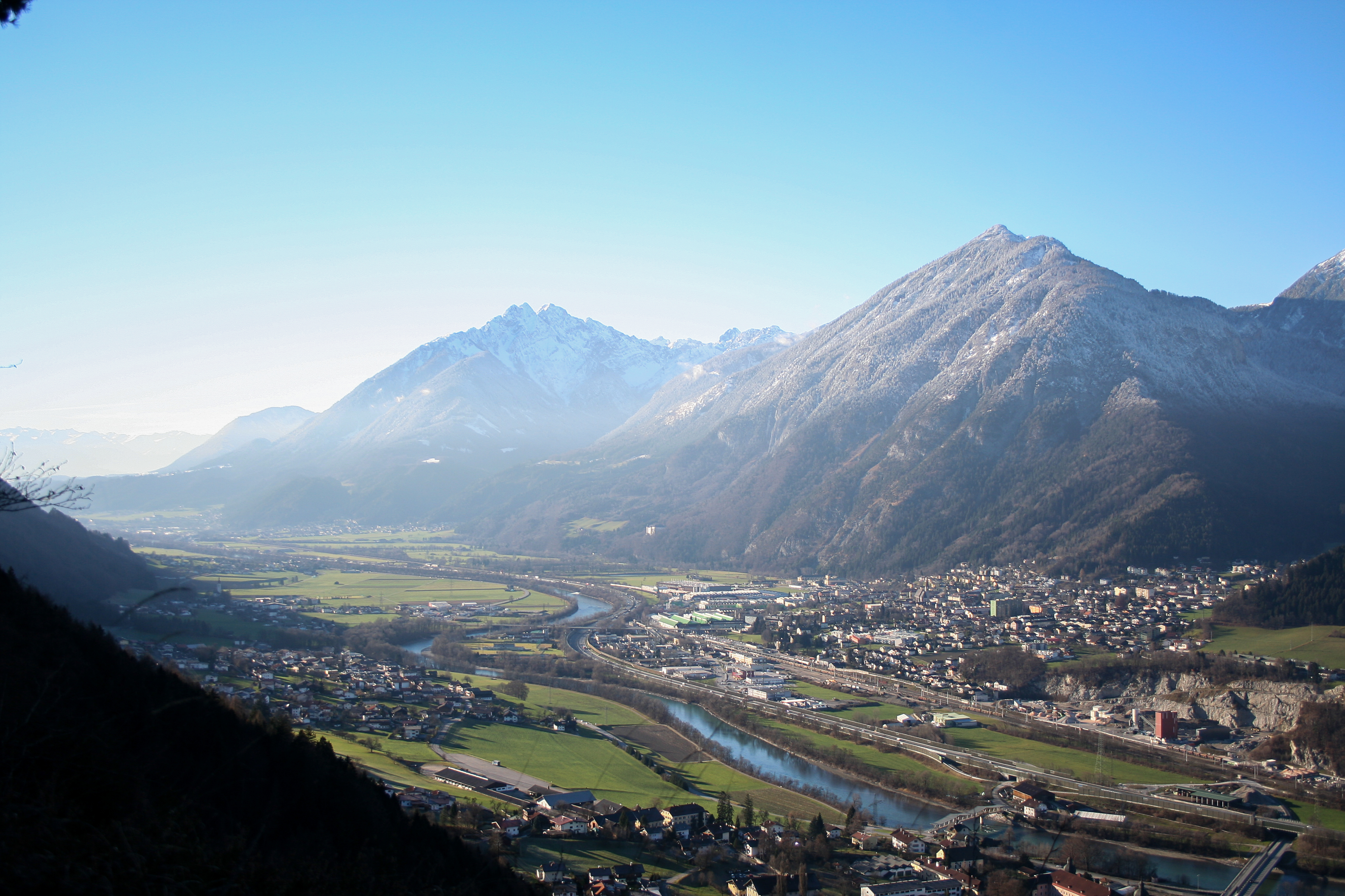 Jenbach in Tirol.